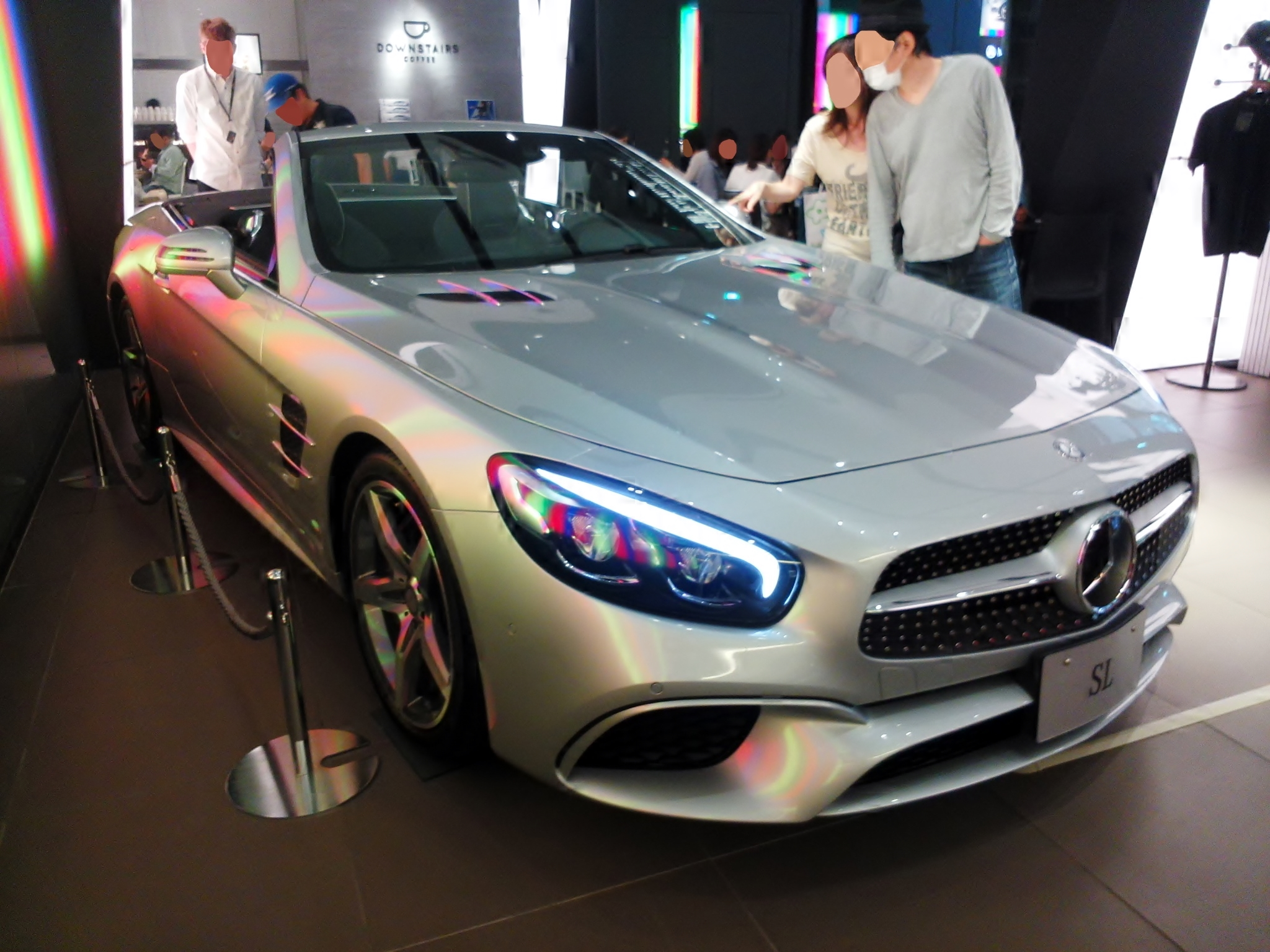 R231型メルセデス・ベンツ・SL400をフロントから撮影。